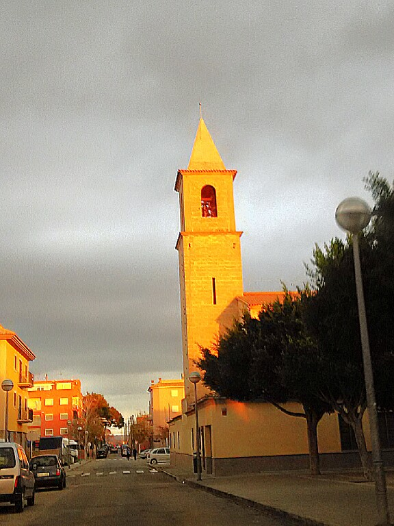 Església Sant Antoni Abad